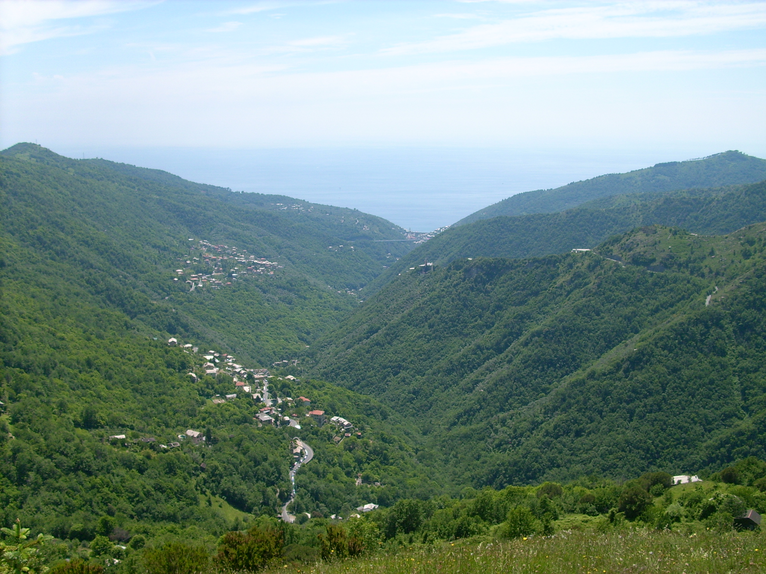 Vista di Sori e delle sue frazioni dal monte Cornua, Liguria, Italia